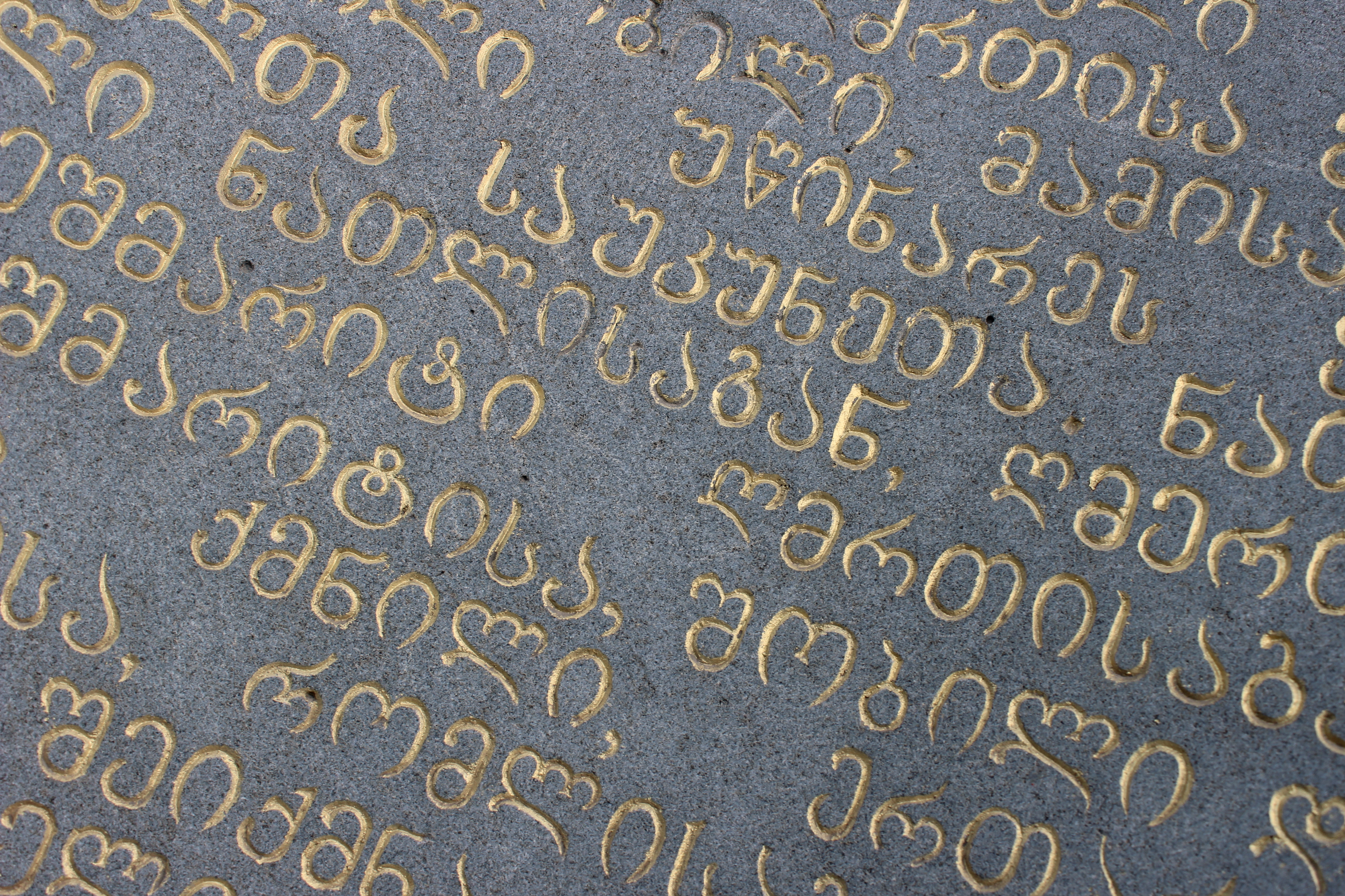 Beautiful Georgian Letters